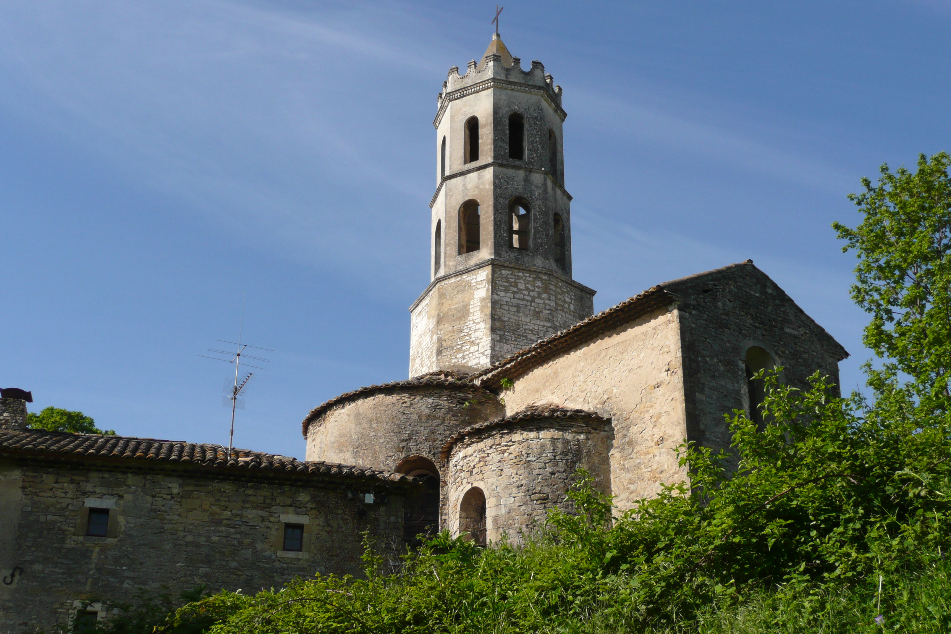 Eglise à Carsan.